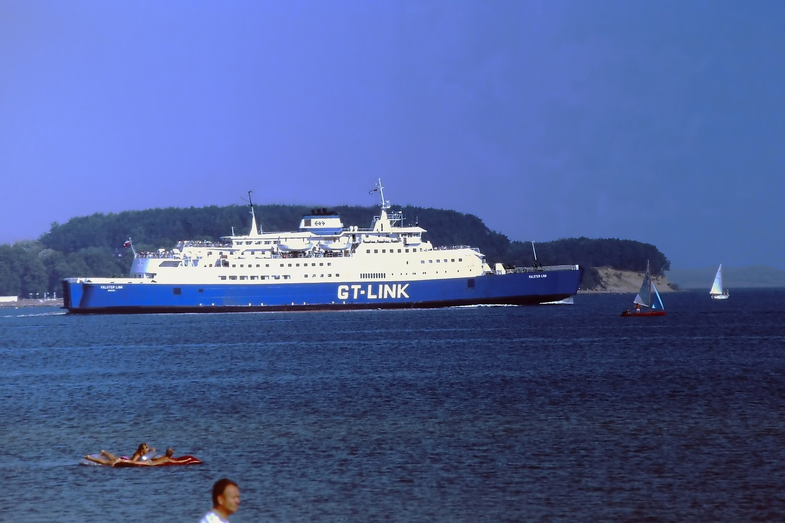 FS Falster Link auf der Gedser-Travemünde-Route, Reederei GT-Link, im Hafen von Travemünde IMO Number: 6910453 MMSI Number: ---- Callsign: HP9255 Length: 118 m Beam: 19 m